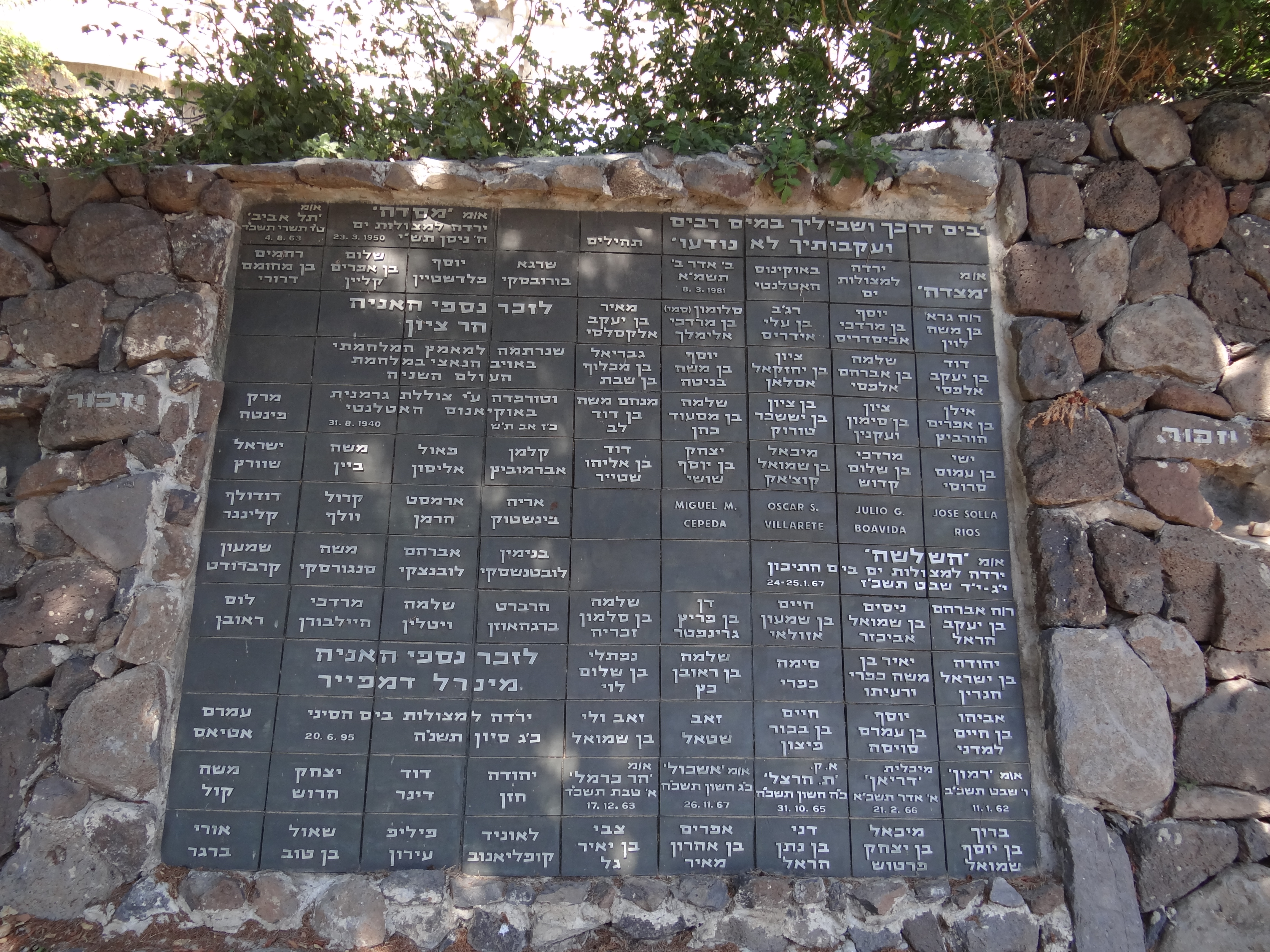 Memorial merchant mariner whose place of burial is unknown in Haifa, Israel אתר ההנצחה לימאי צי הסוחר שמקום קבורתם לא נודע, הממוקם בעיר חיפה, מוקדש להנצחת שמותיהם של ימאים נעדרים מאוניות צי הסוחר הישראלי, שניספו בים.